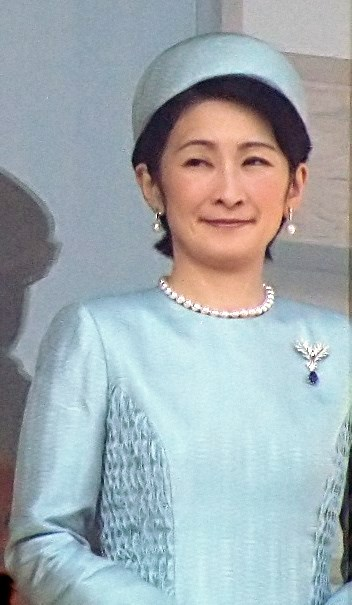 天皇誕生日の一般参賀にて